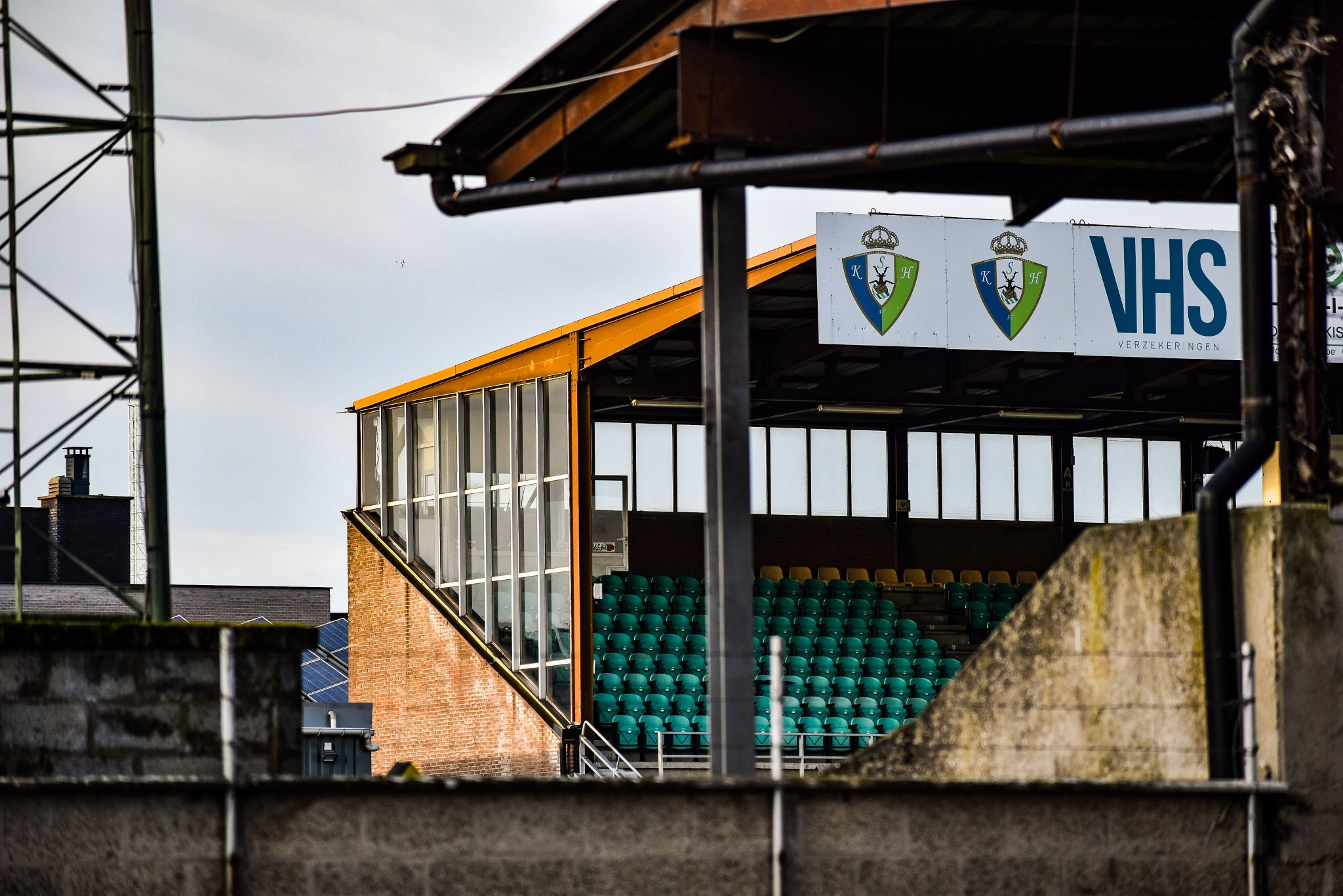 Hasselt